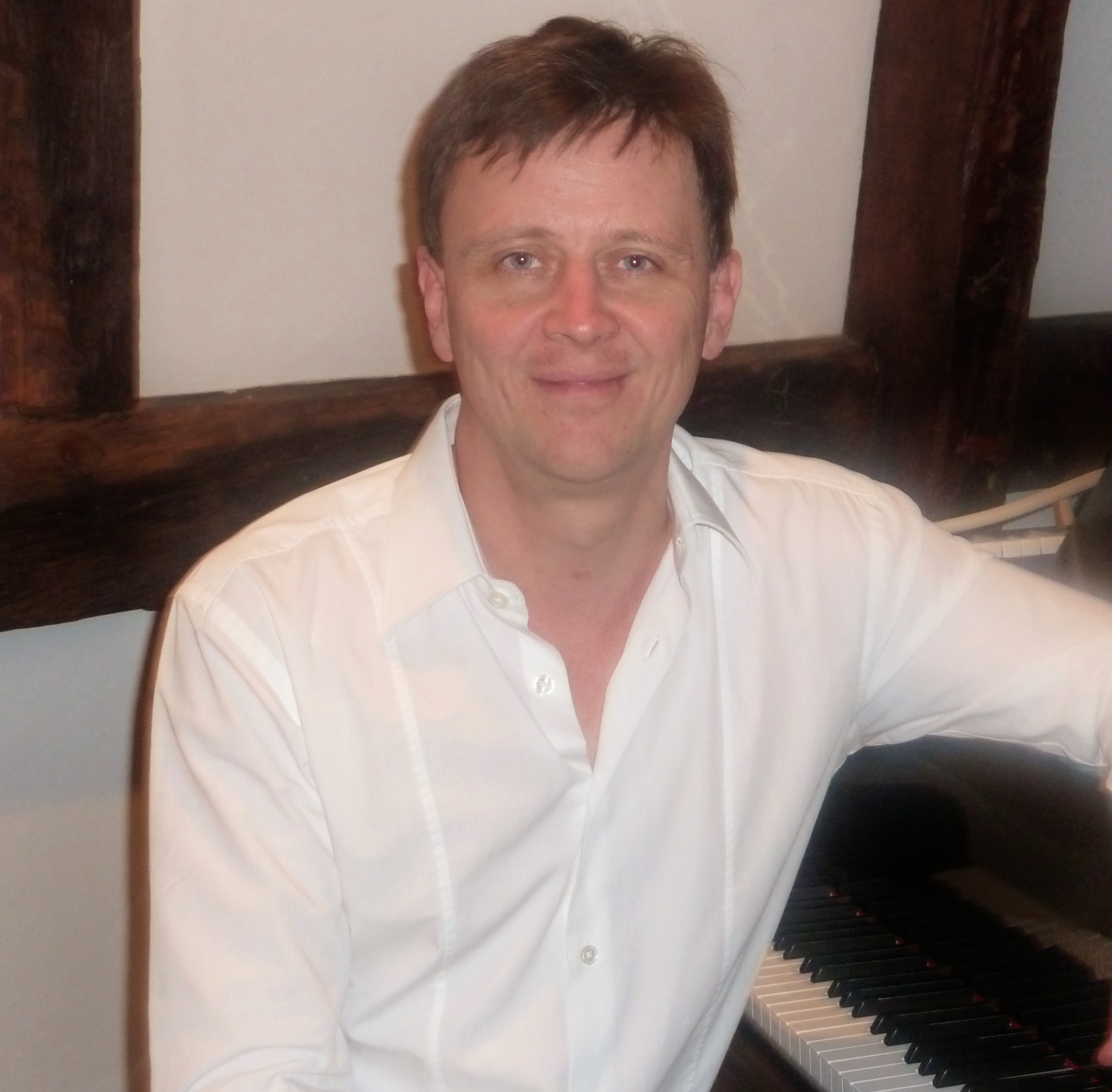 Jazz-Pianist Andreas Schnermann nach einem Konzert mit dem Poetry Clan in der Burg Bielstein in Wiehl